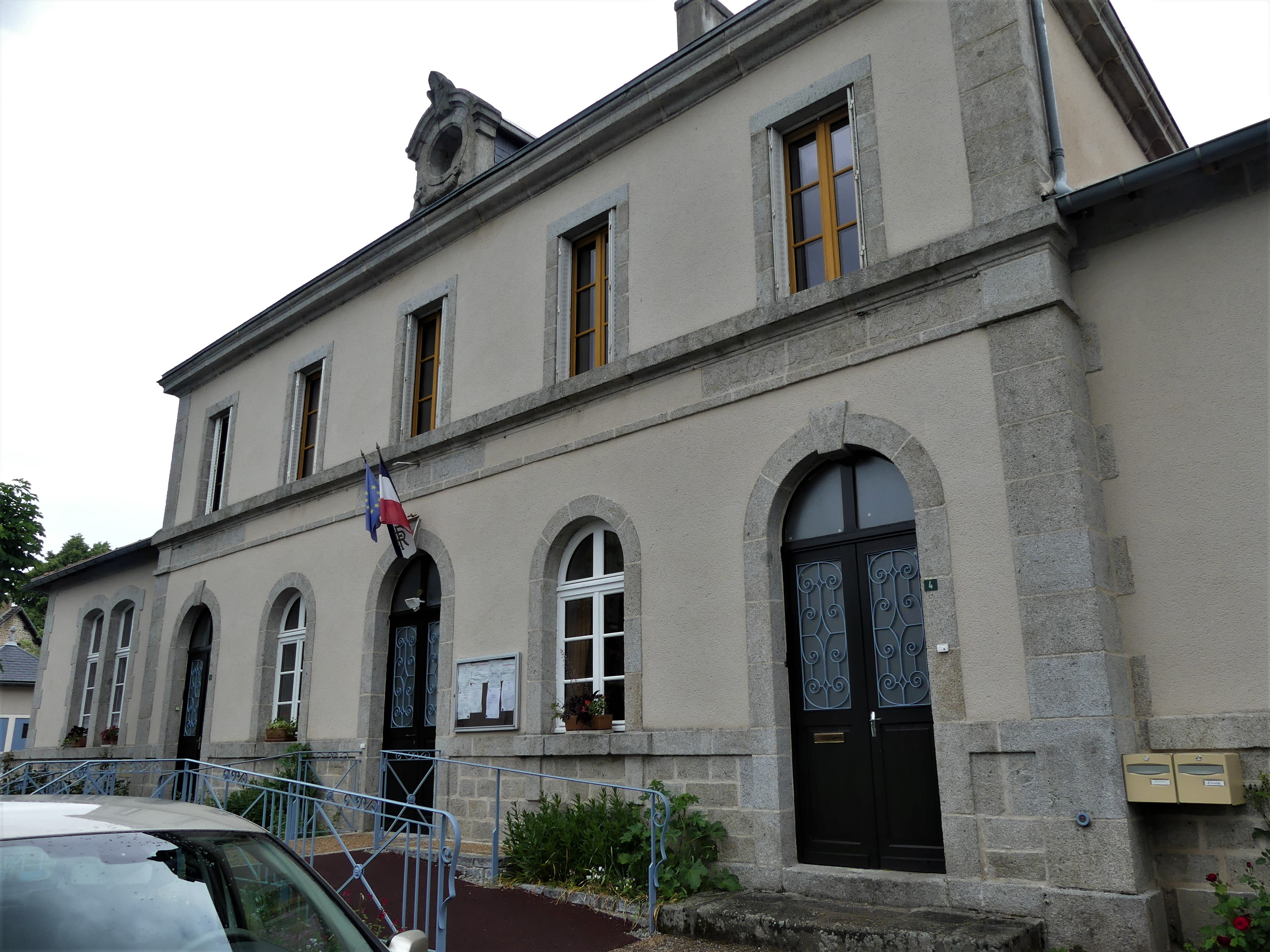 La mairie de Champagnat, Creuse, France.